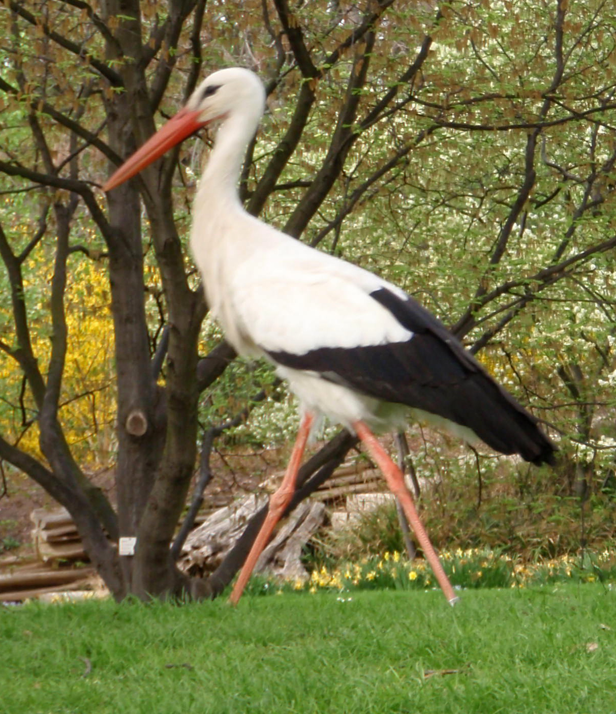 Storch im Luisenpark Mannheim (Deutschland)